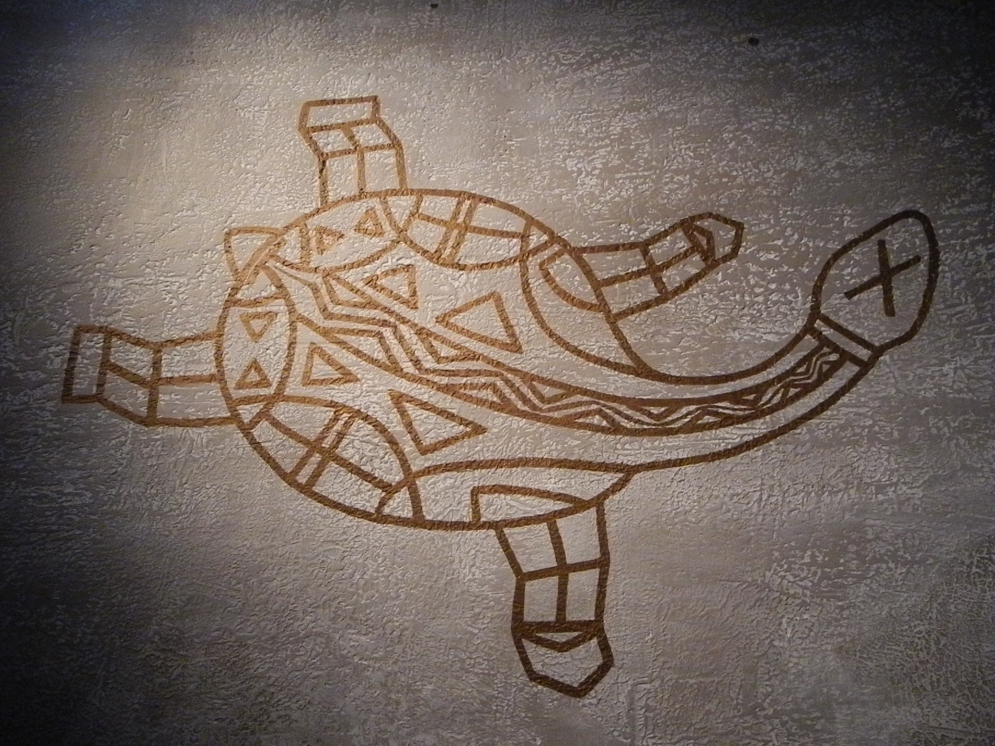 Baku- Museum Gobustan_02.JPG